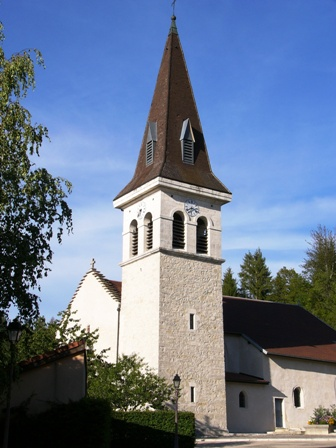 Église Saint Laurent d'Arbent, Ain, France.